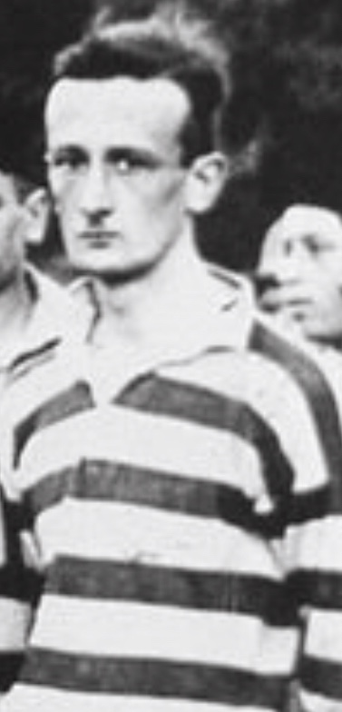 Fizik Profesörü Fahir Yeniçay